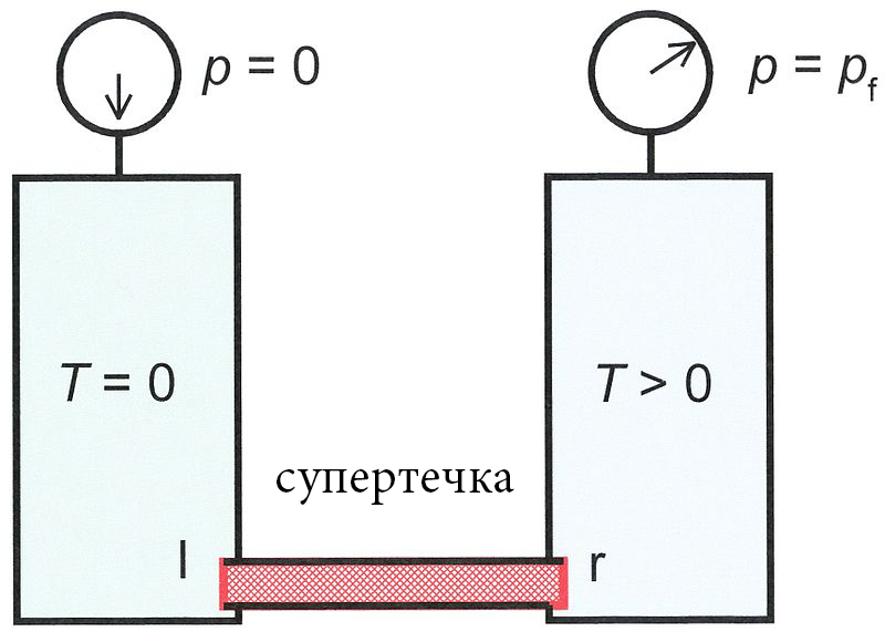 Demo fountain pressure 01